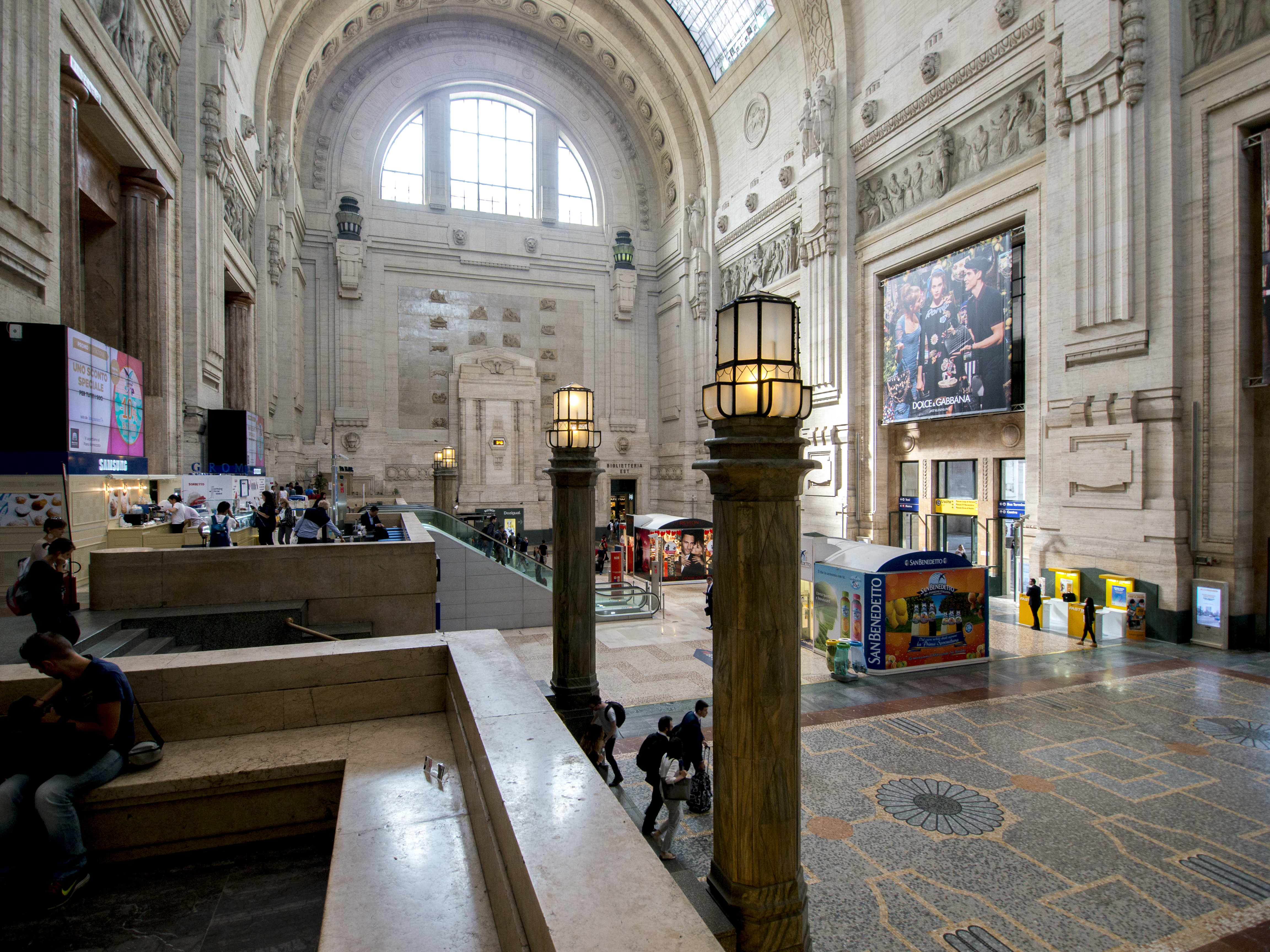 Stazione Centrale Entrance Hall, Milano